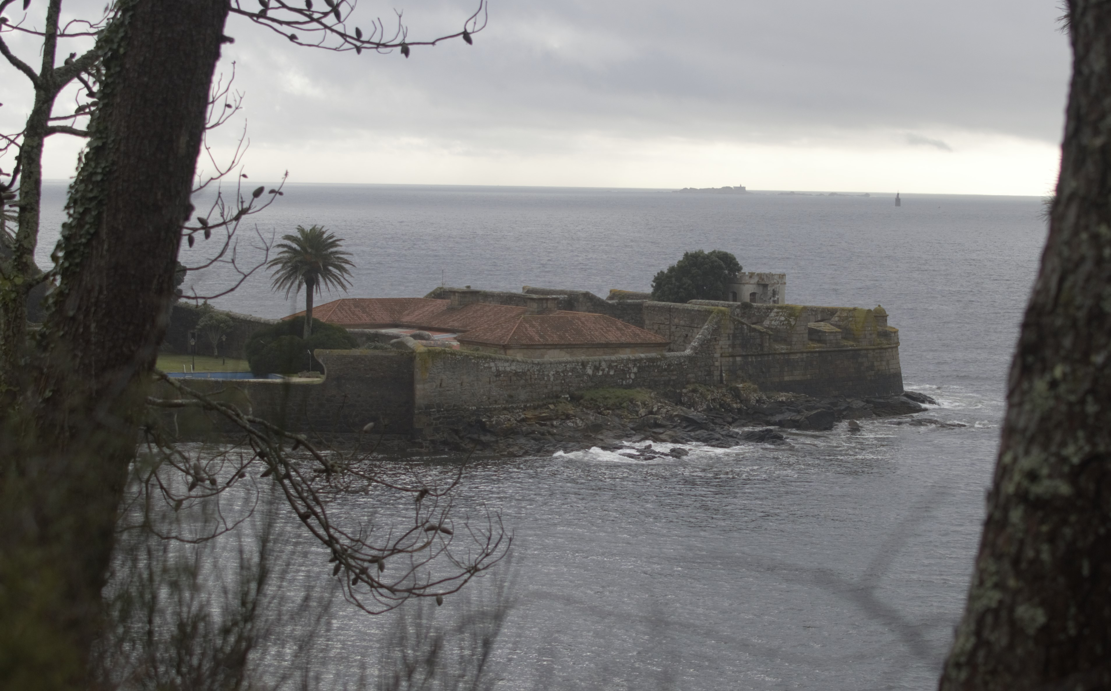 Esta es una imagen del "Castelo do príncipe (Castillo del príncipe)" situado en el ayuntamiento de Cee.